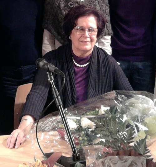 Marija Pirjevec in Trieste